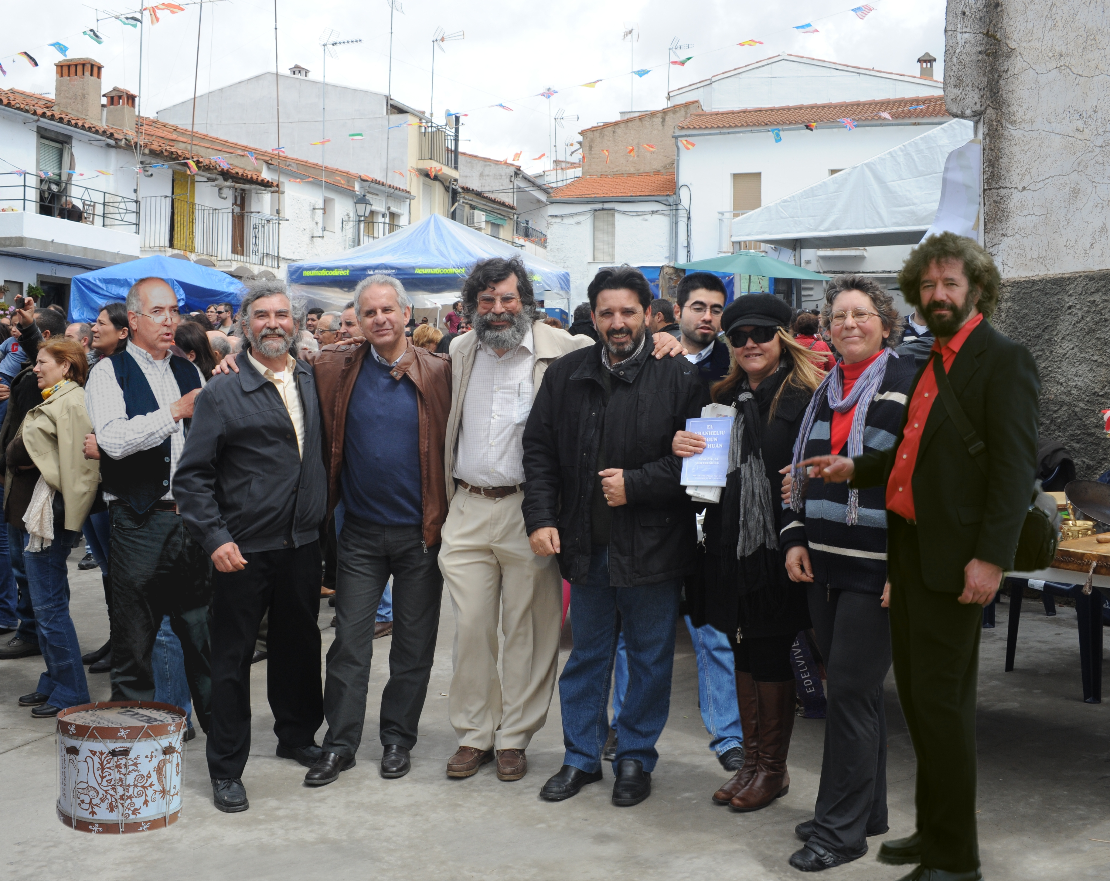 Escritores extremeños en el Festivalino| de Pescueza. Taller de habla extremeña, abril 2012. De izquierda a derecha: Cruz Díaz Marcos (poeta), Fran Herrero Uceda (folclorista), José María Alcón Olivera (novelista), Miguel Herrero Uceda (escritor), Javier Feijoo (poeta), Ismael Carmona García|(filólogo), Mª Ángeles (esposa de J. Feijoo), Elisa Herrero Uceda (escritora) y Antonio José Herrero (pintor e ilustrador).